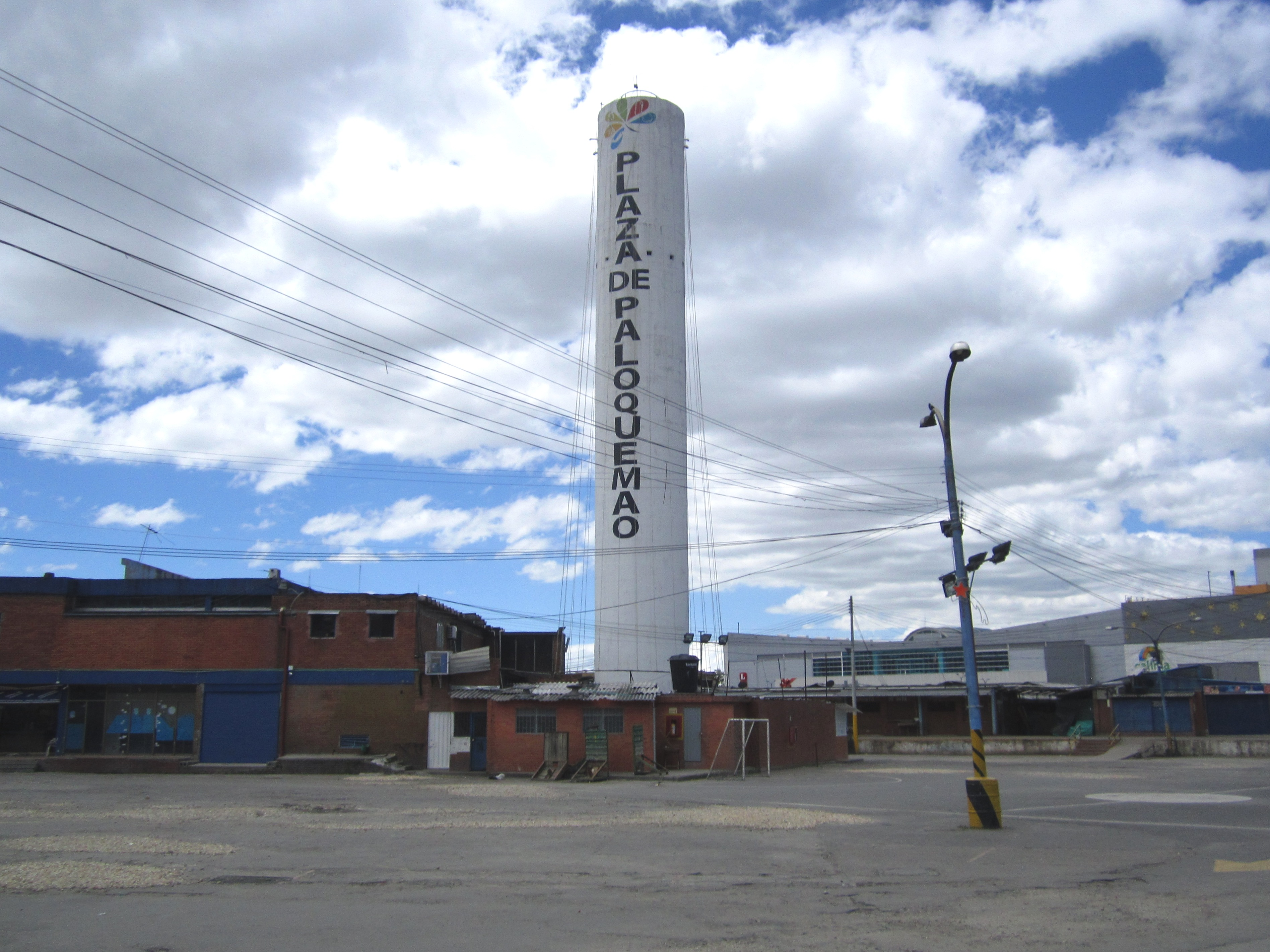 Plaza de Paloquemao, localidad de Los Mártires, ciudad de Bogotá.